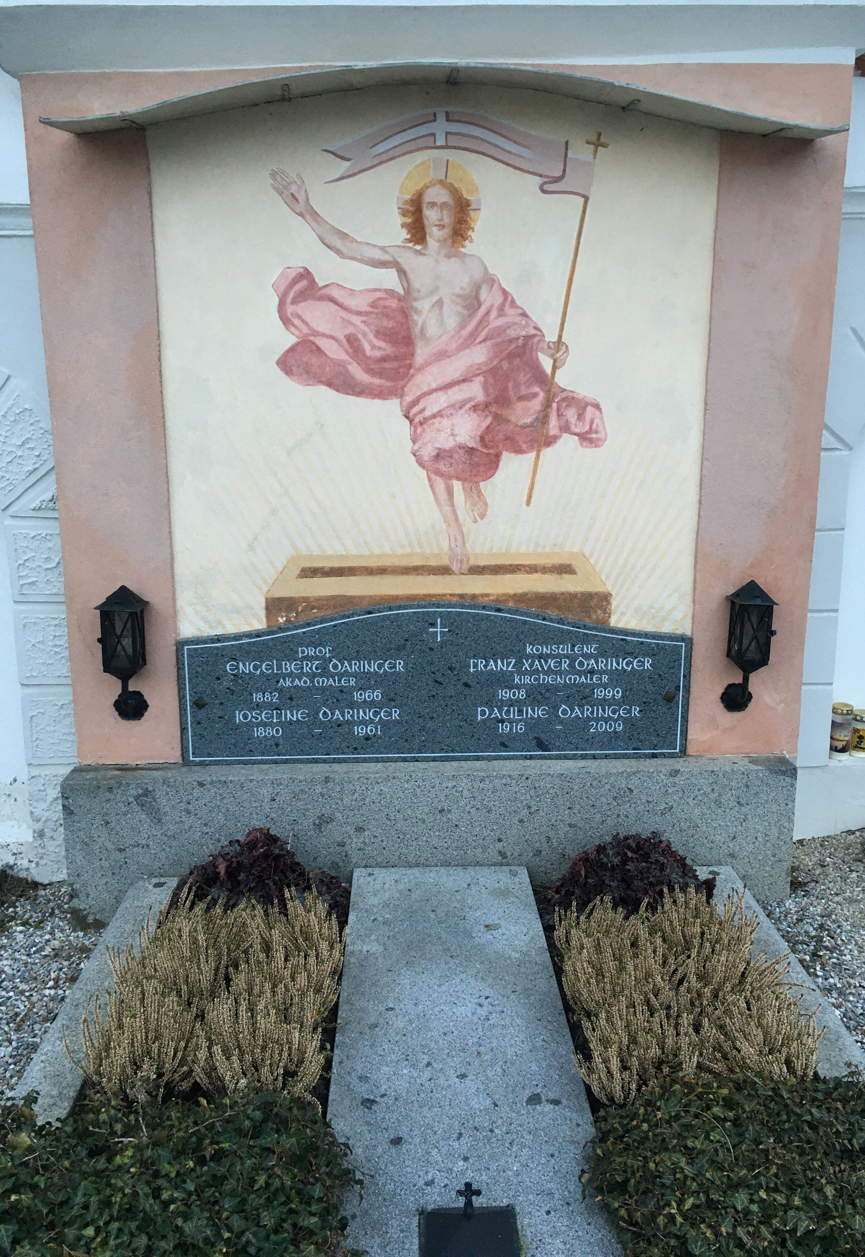 Friedhof Aspach, Bezirk Braunau, Oberösterreich: Grabstätte der Künstlerfamilie Daringer